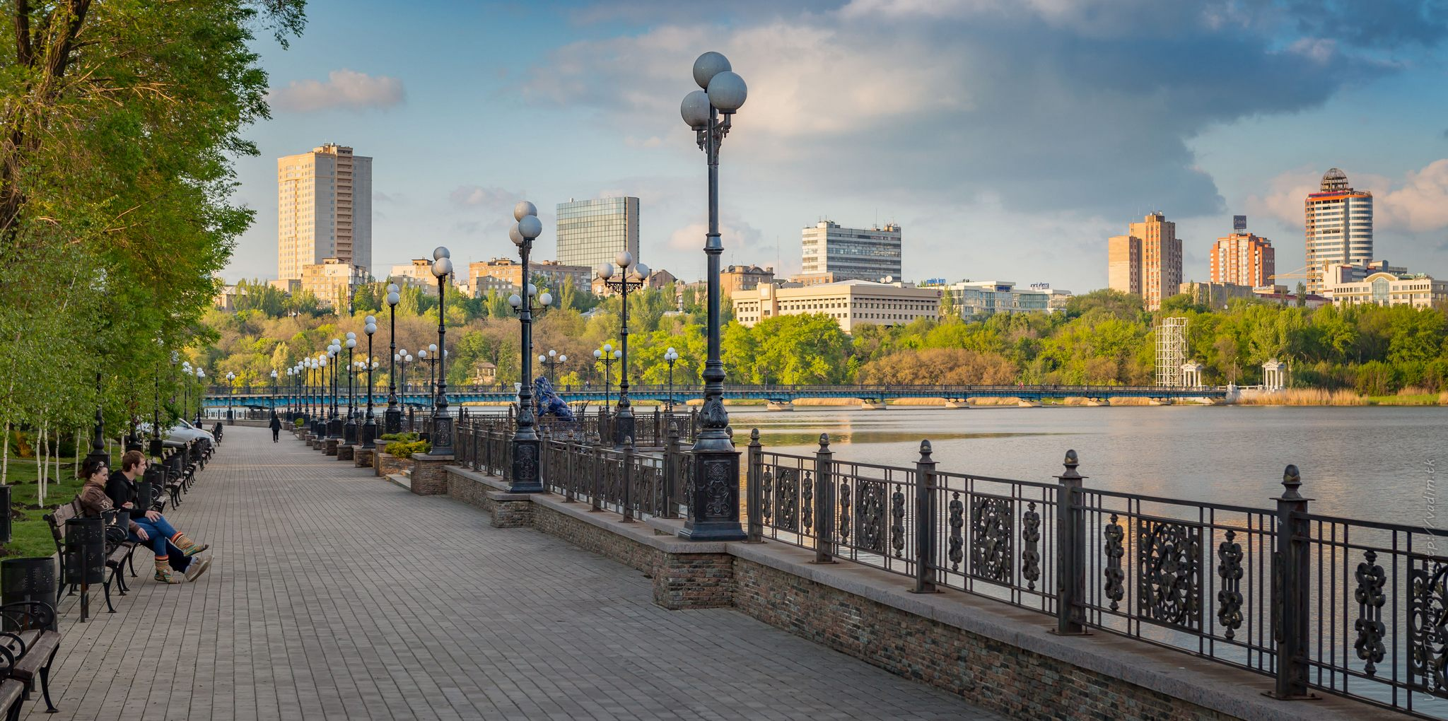 Донецк, городской парк имени Щербакова, 2016